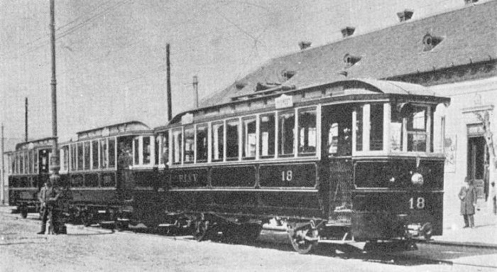 A Budapest-Szentlőrinci Helyiérdekű Villamos Vasút (BLVV) 18-as pályaszámú motorvonat az 1910-es években